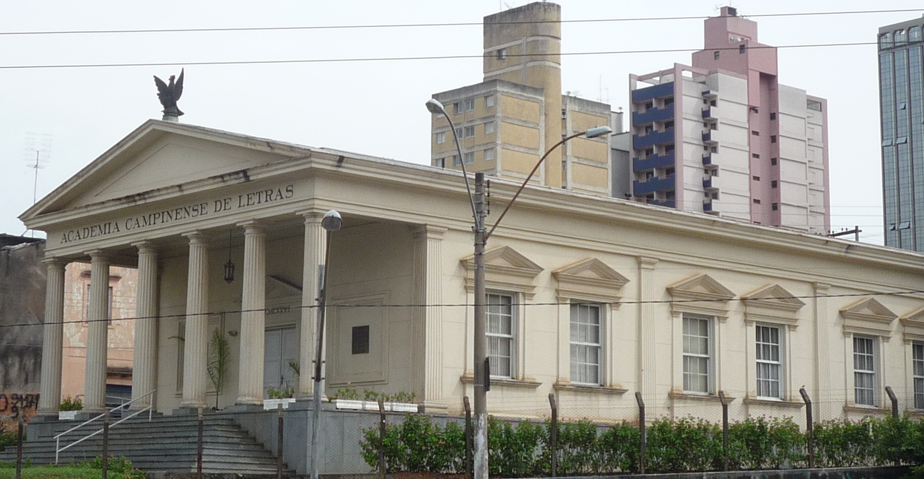 Academia Campinense de Letras